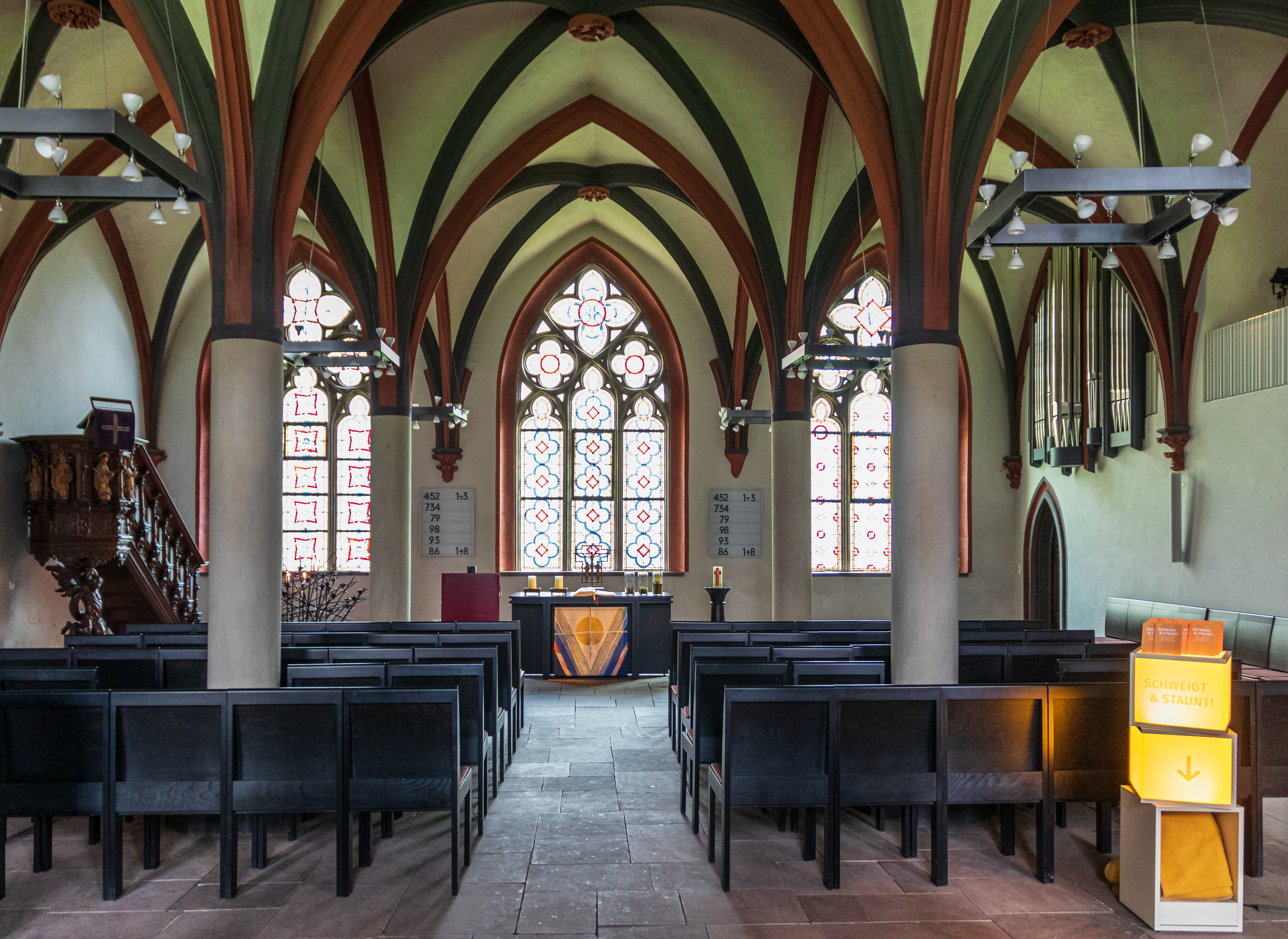 Kloster Walkenried – Kapelle